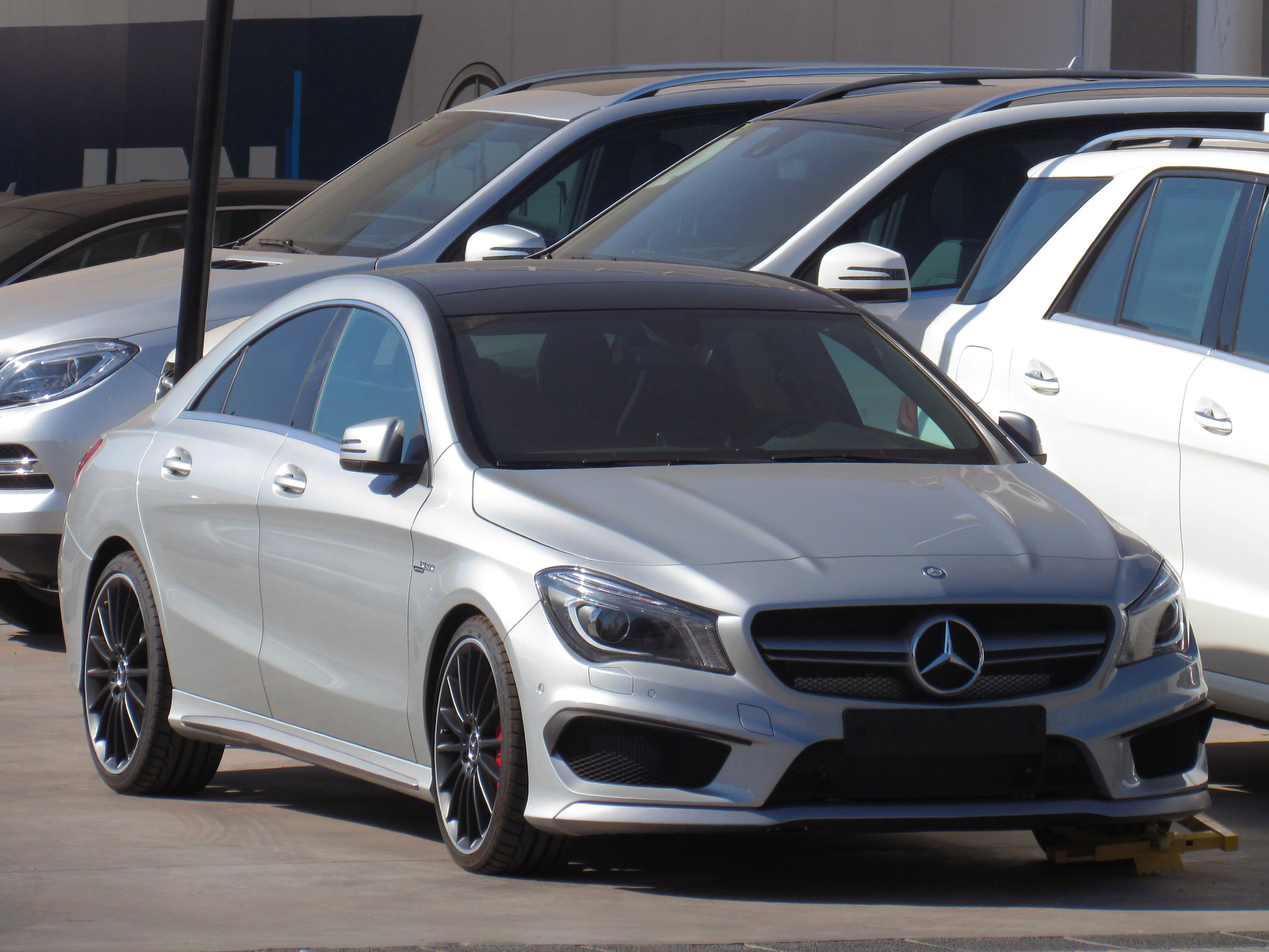 Mercedes Benz CLA 45 AMG Turbo 2014